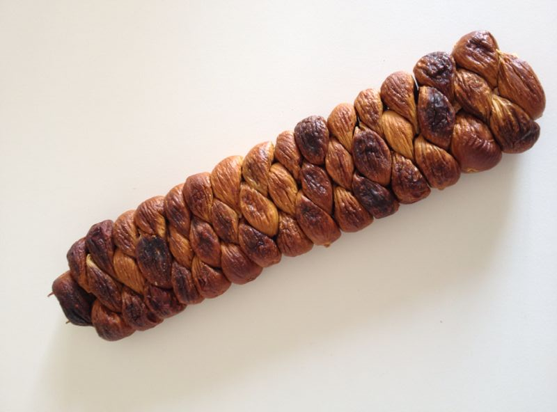 Fichi secchi